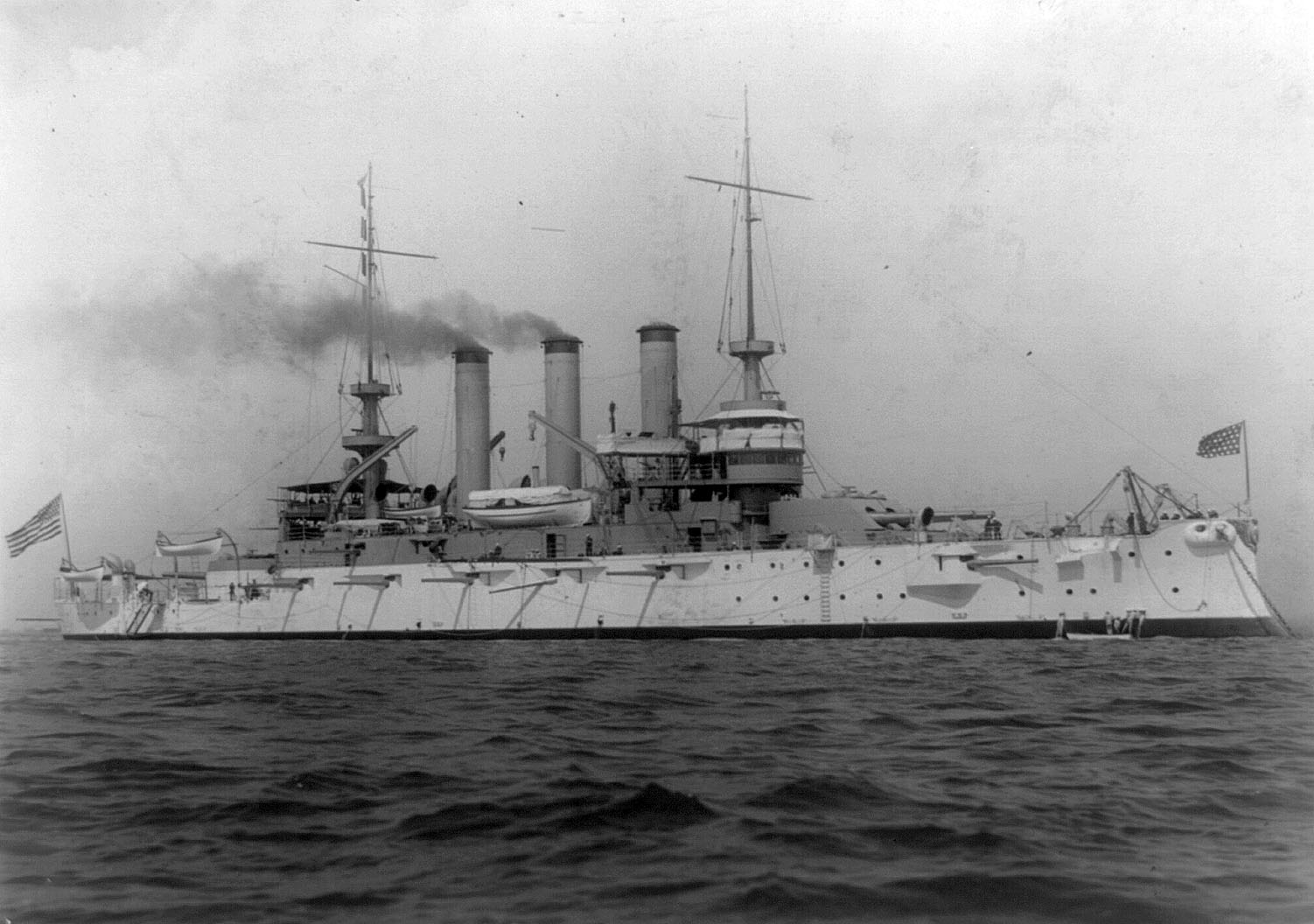 USS Missouri (BB-11), c. 1906